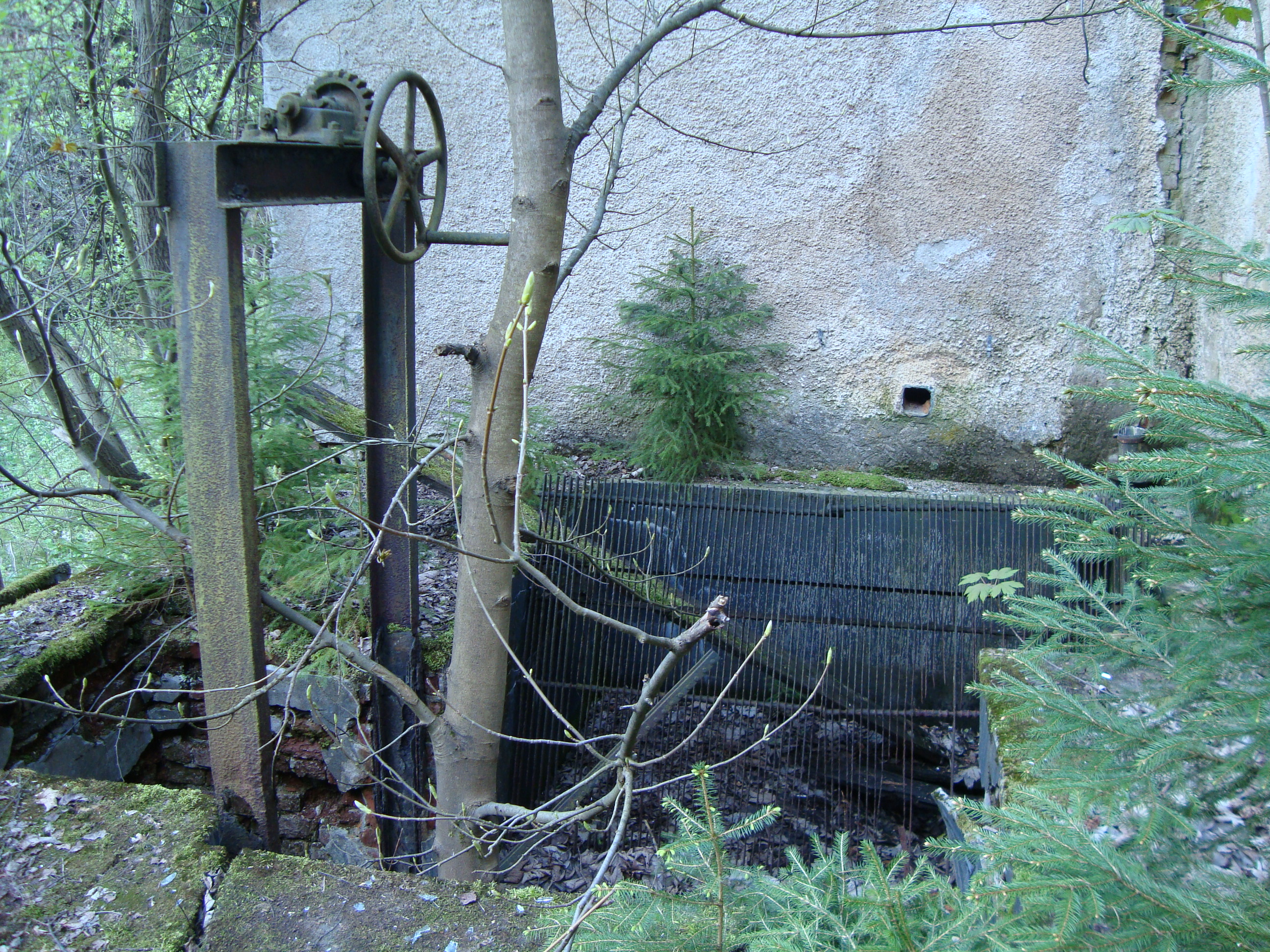 Detail Wolfner Mühle im Erzgebirge